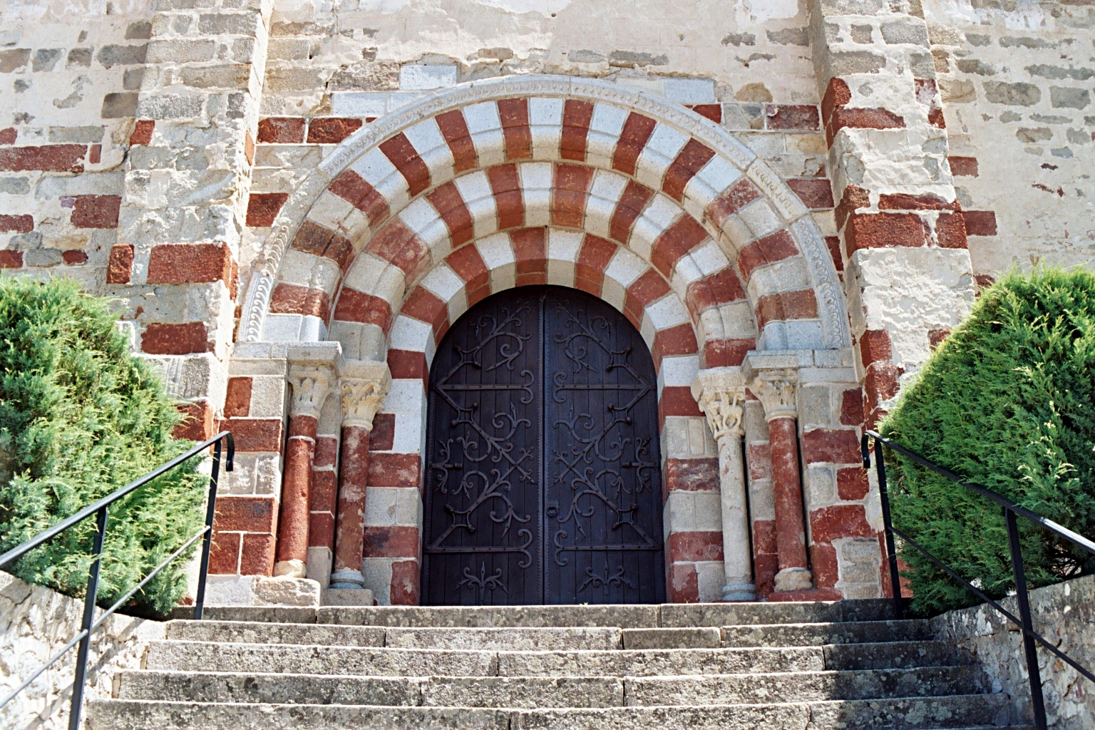 France - Auvergne - Église Saint-Didier de Saint-Dier-d'Auvergne